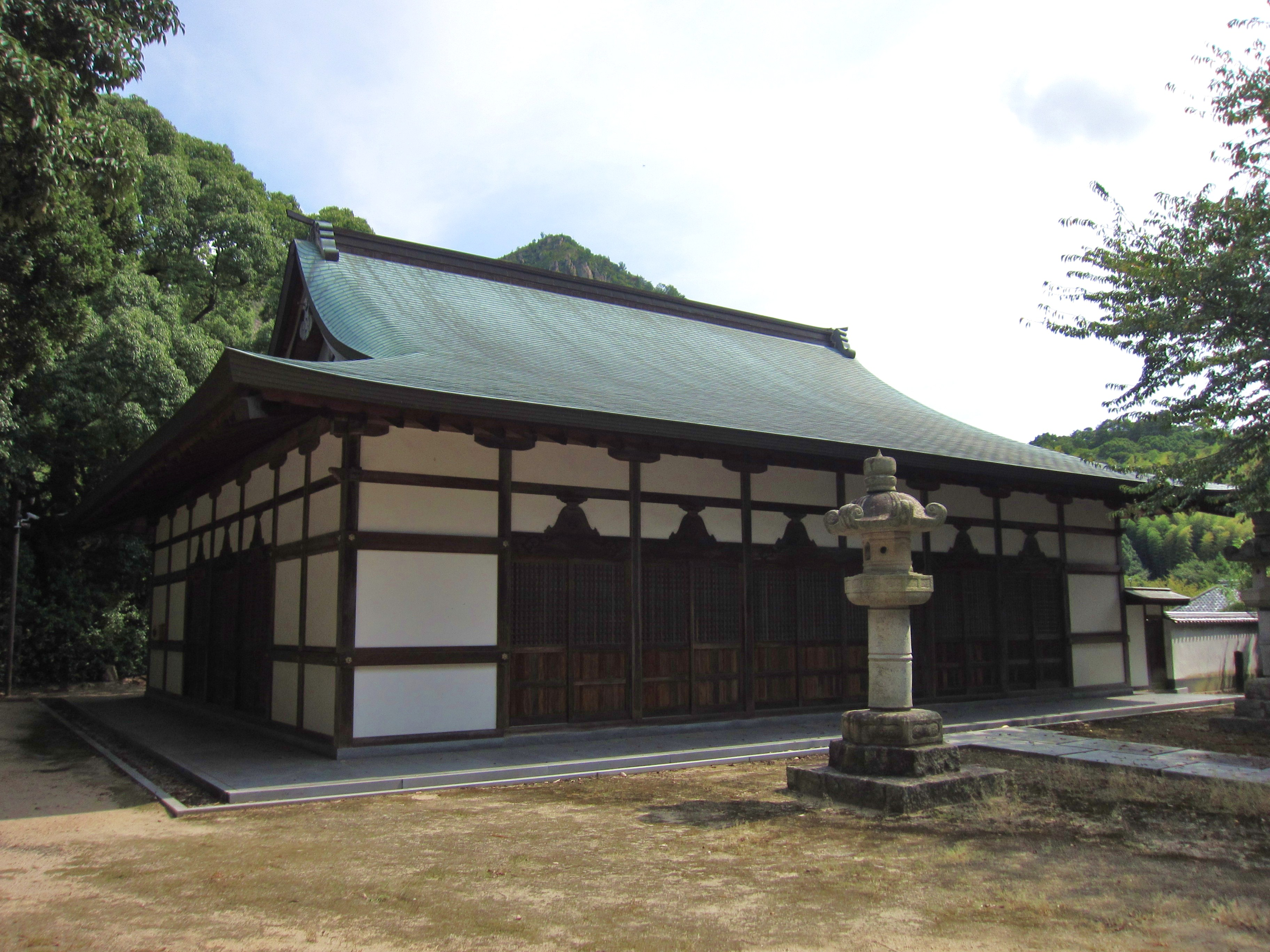 祖霊社 (大山祇神社末社)